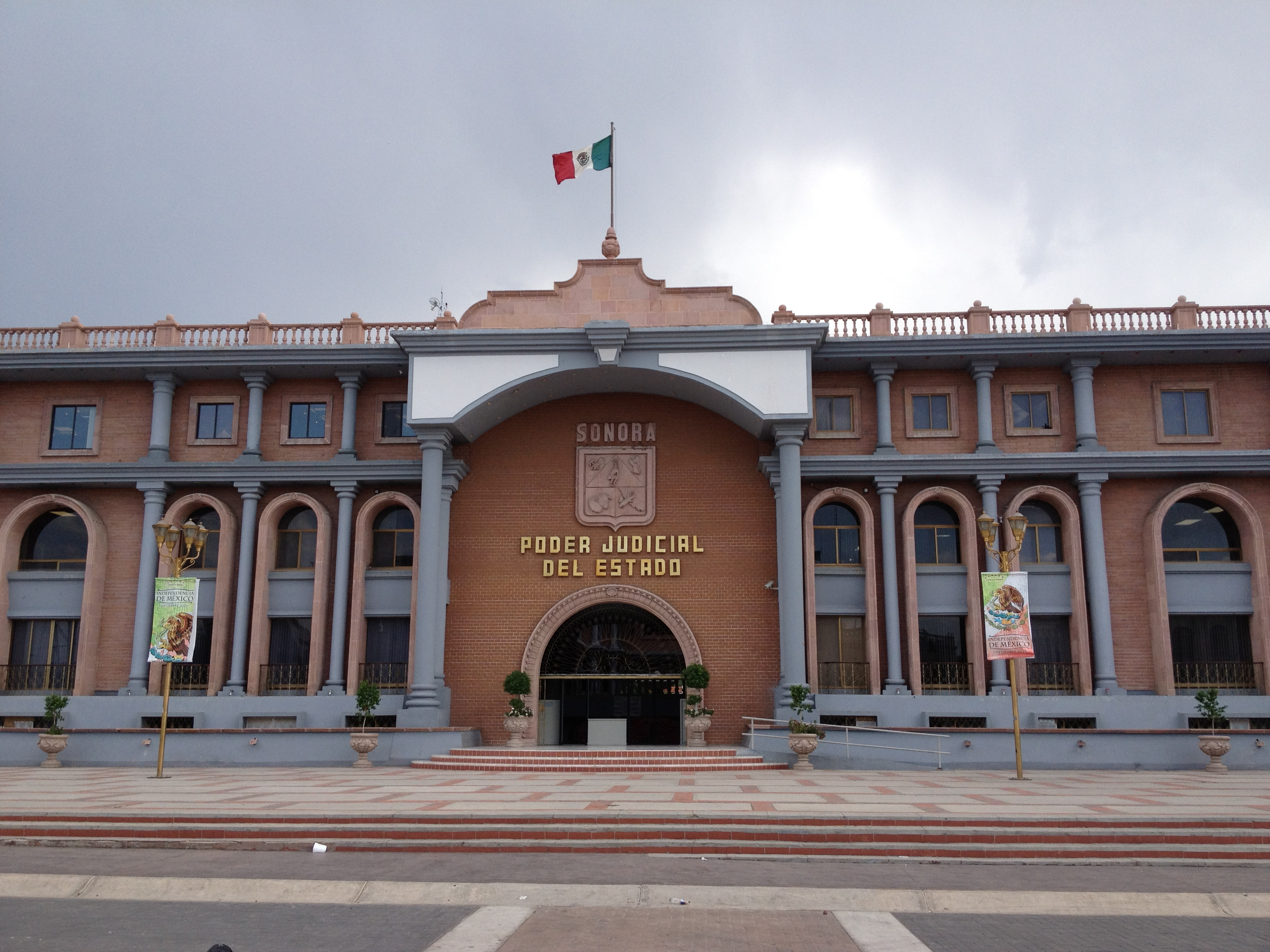 Edificio del Poder Judicial del Estado de Sonora, Hermosillo, México.